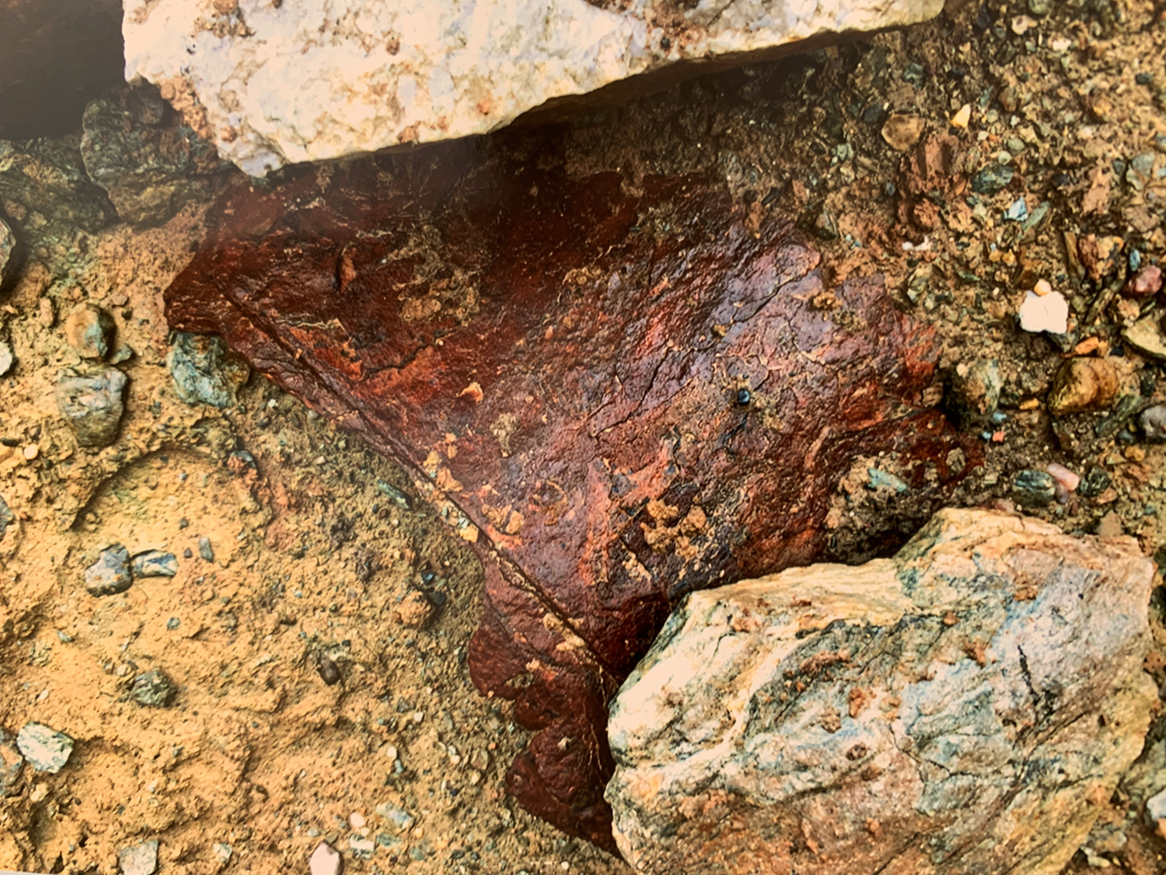 Rhan o'r Stewart, llongddrylliad ym Mhorth Ty Mawr, 1901.